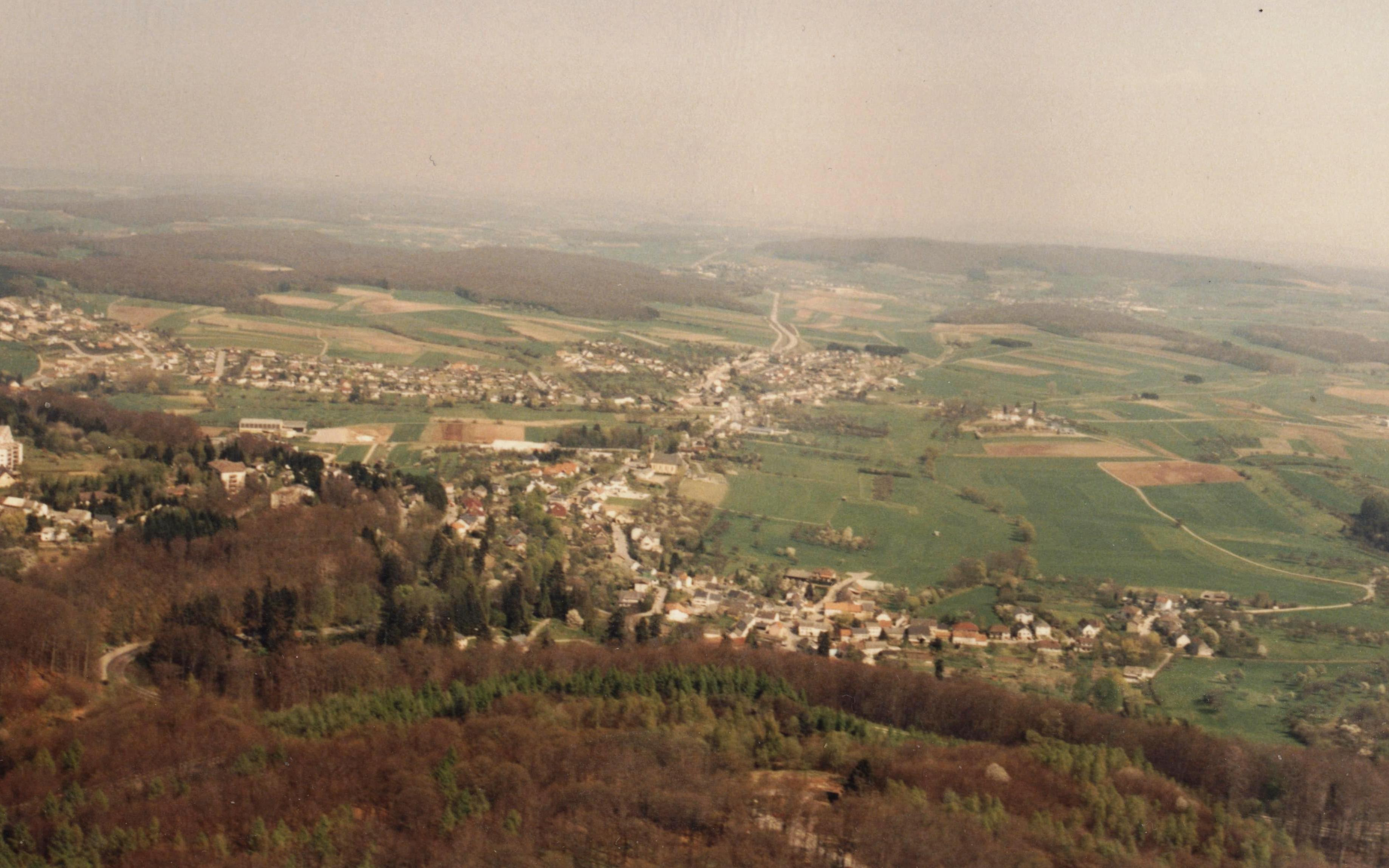 Sennengen a Nidderaanven